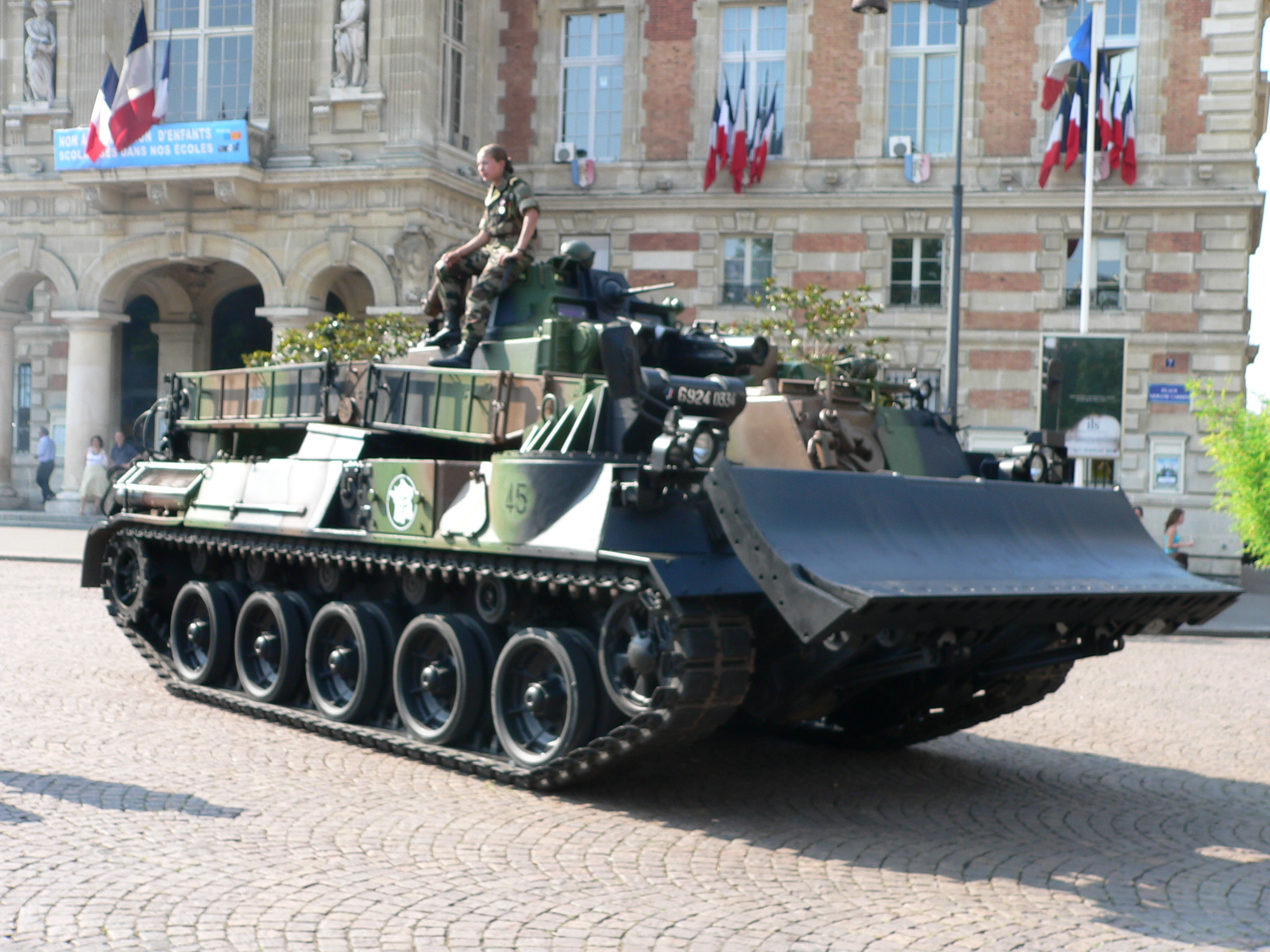 Engin Blindé du Génie. Photograph taken at: Military parade, Avenue des Champs-Élysées, 14 July 2006